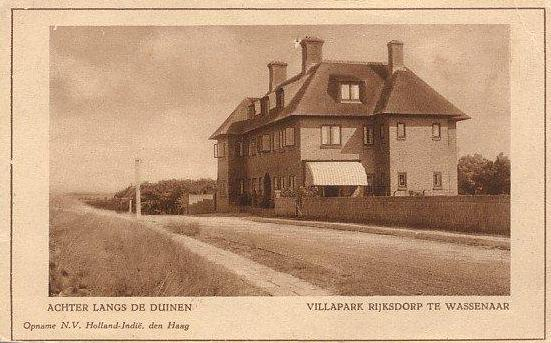 Rijksdorp villapark (picture around 1925)